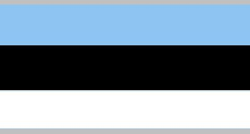 Corpsburschenband des Corps baltica-Borussia Danzig zu Bielefeld